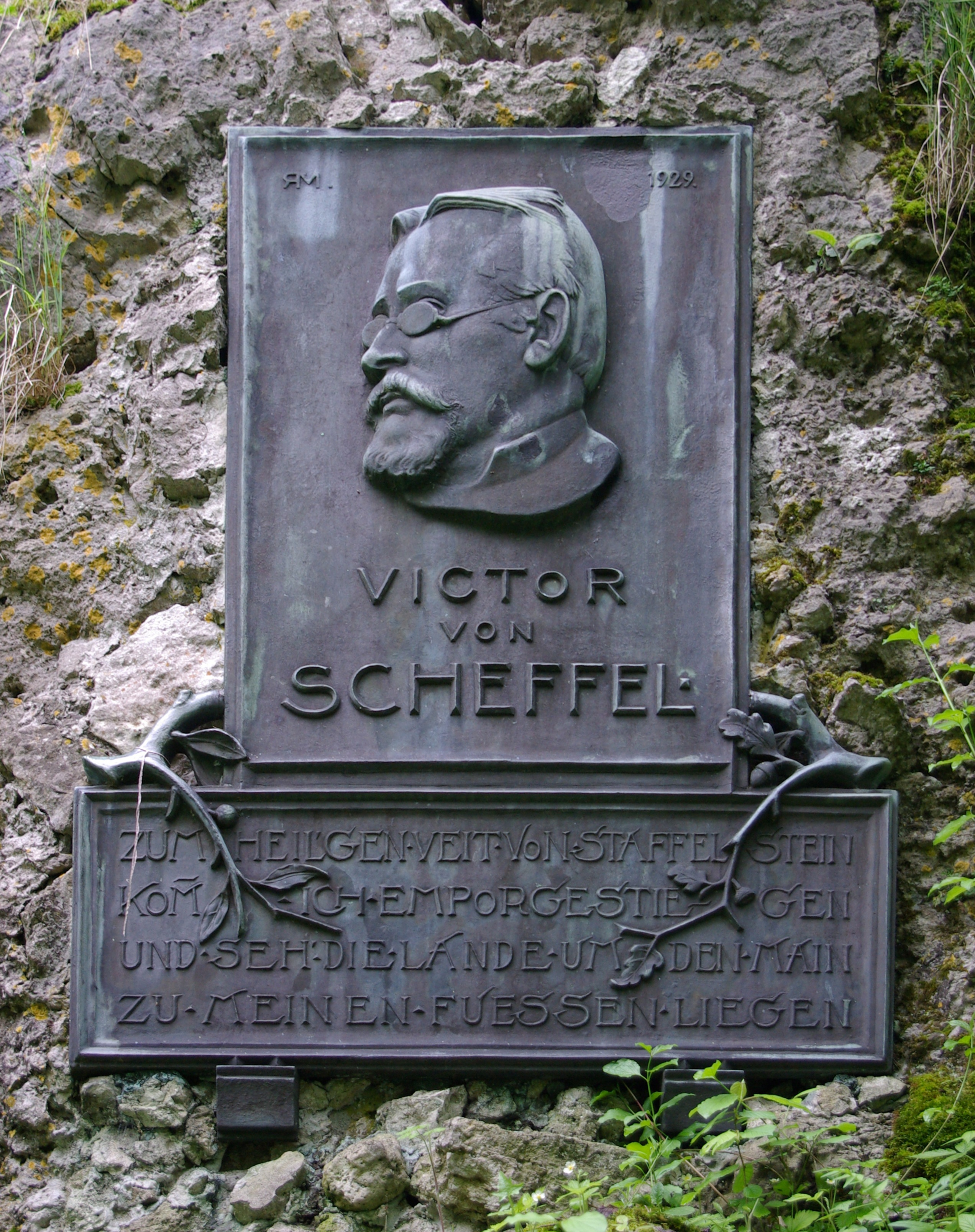 Das 1929 errichtete Scheffel-Denkmal am Hang des Staffelbergs mit der vierten Strophe seines Frankenliedes (1859). Das Denkmal ist ein großer Riffdolomit-Felsblock, der im unteren Teil des Berges mit seinem Mergelkalk nicht seine ursprüngliche Lage hat. Vielmehr stammt er aus der Riffstufe am Gipfel des Staffelbergs. Der Felsen löste sich durch Frostsprengung aus dem Gipfelgestein, stürzte und rollte hinab auf seinen jetzigen Standort.